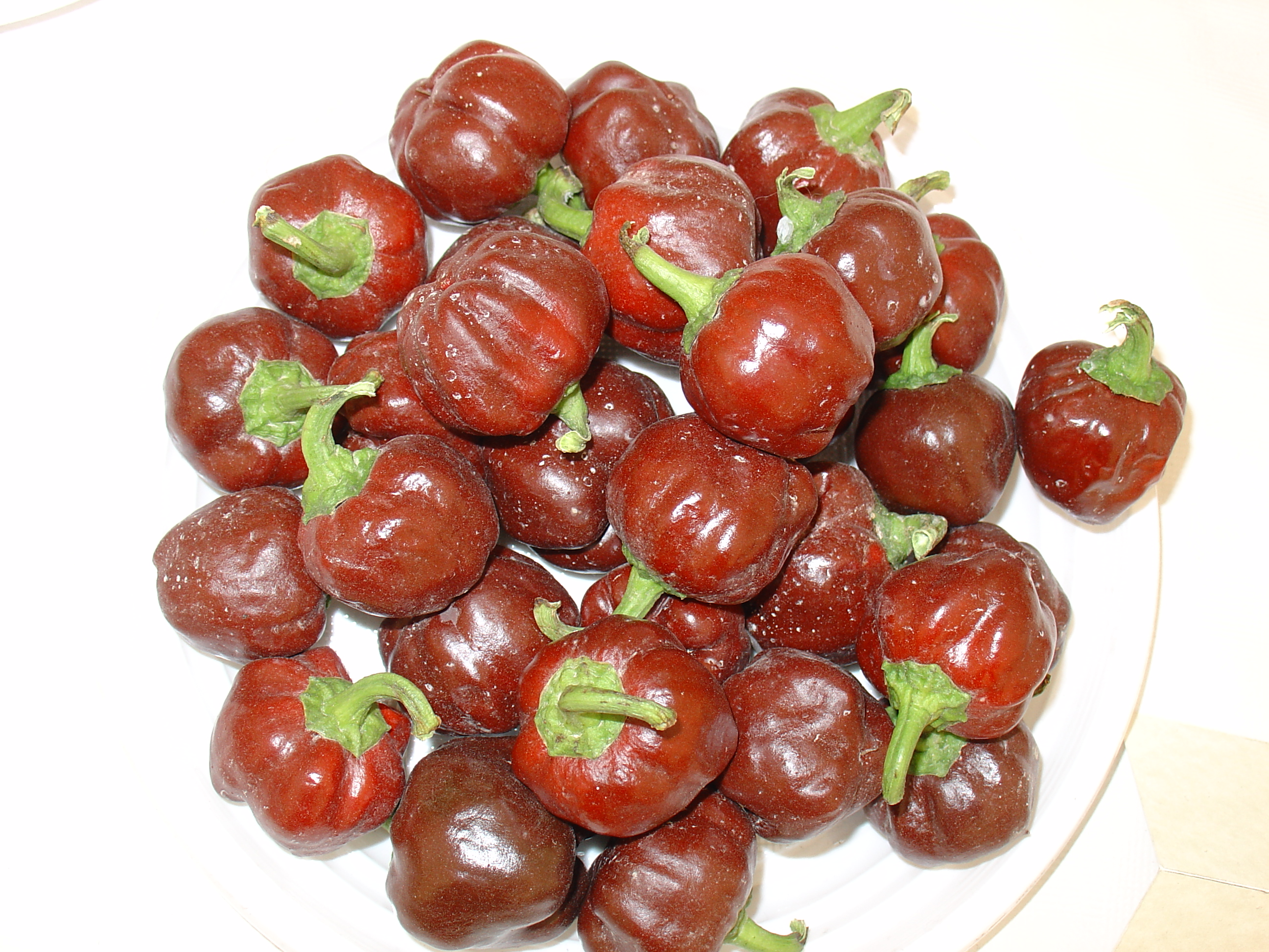 Ñoras levantinas de España, variedad de Capsicum annuum